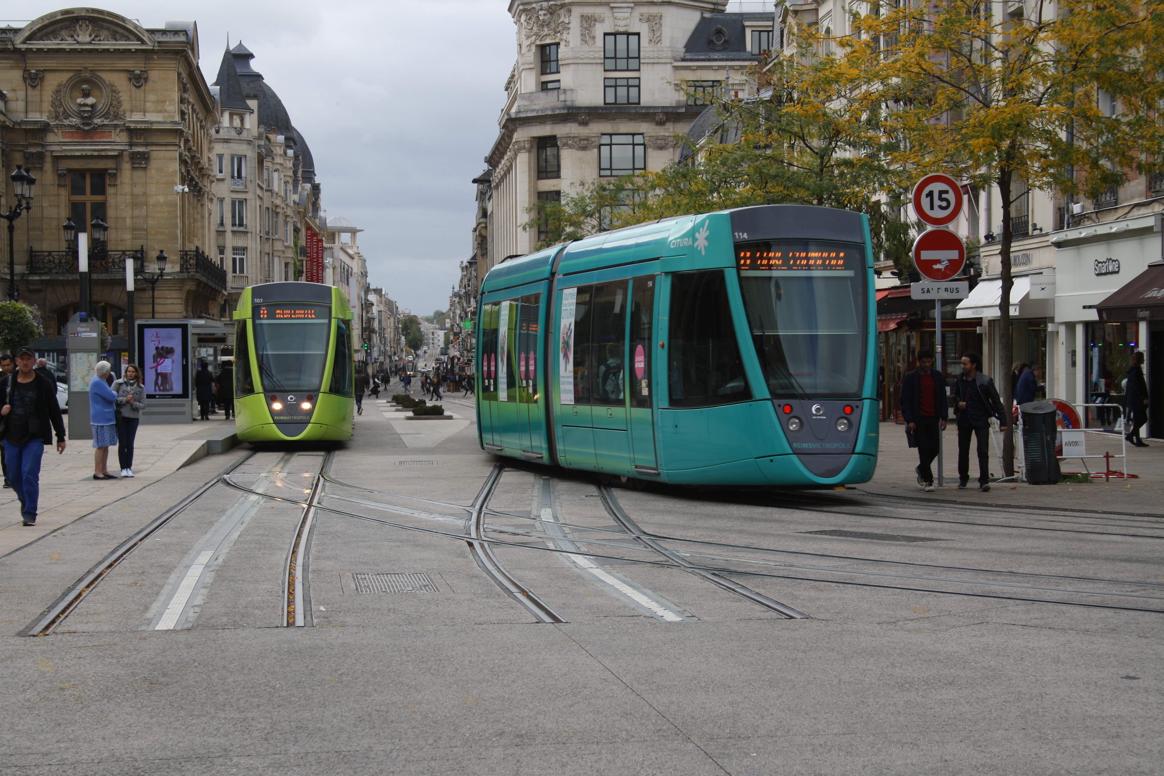 Straßenbahn Reims, Haltestelle Opéra